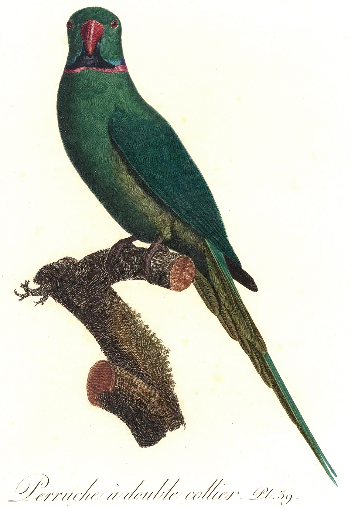 Perruche à double collier (Psittacula eques eques). Plate 39 from François Levaillant's Histoire naturelle des Perroquets. Paris, 1801-1805. By Jacques Barraband (1767–1809).